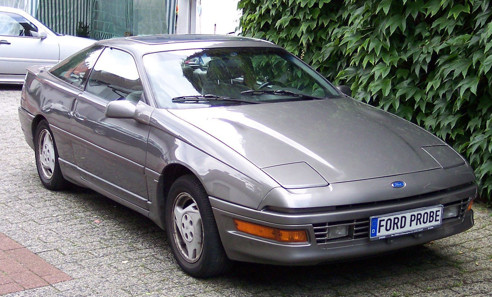 Modified version of Image:Ford Probe I grey vr.jpg